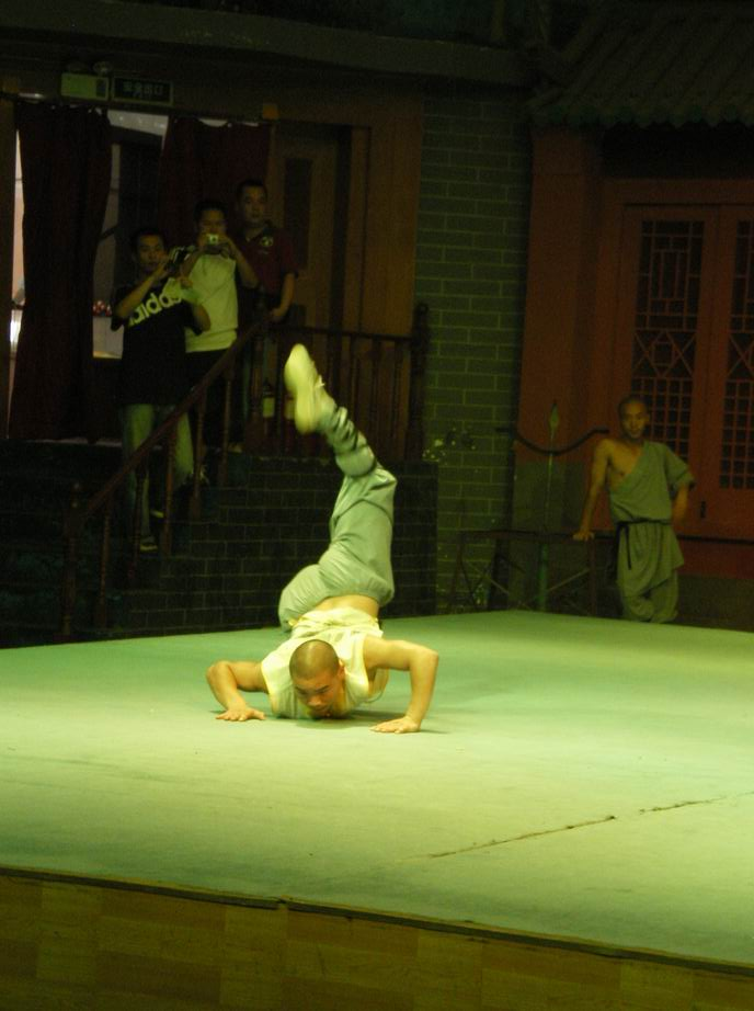 מופע קונג פו במקדש השאולין, מחוז חנאן, סין רישיון נוצר על ידי משתמש:Gsella